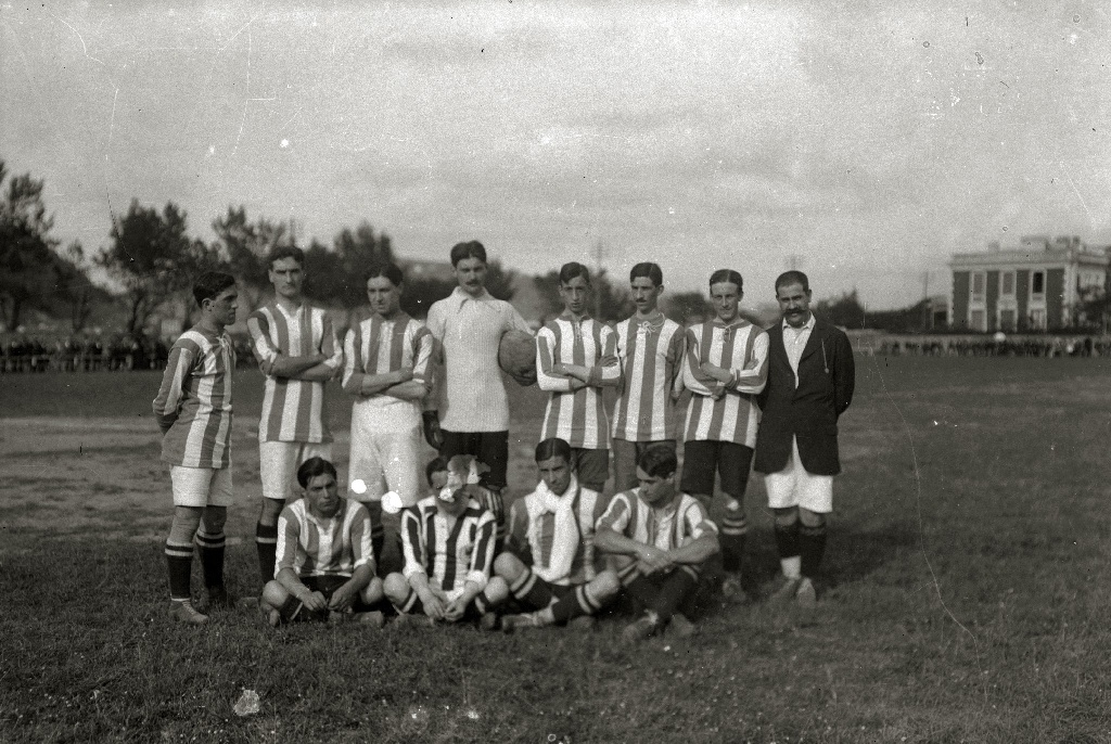 Título original: Equipo de fútbol de la Real Sociedad en el campo de Ondarreta (1/1) Localización: San Sebastián (Guipúzcoa)